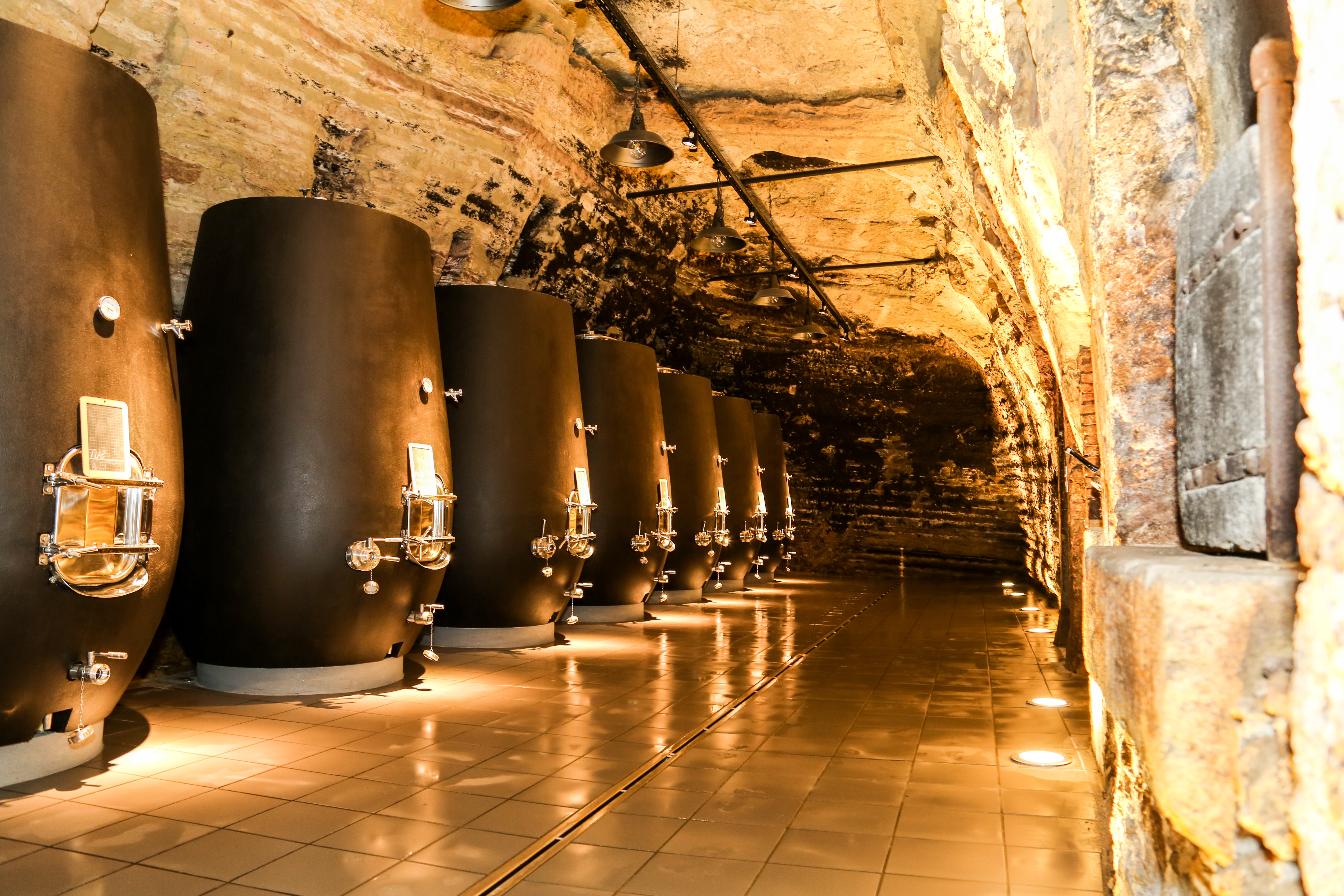 La Cave troglodyte du Prieuré de l'Oratoire et ses Cuves Tulipes